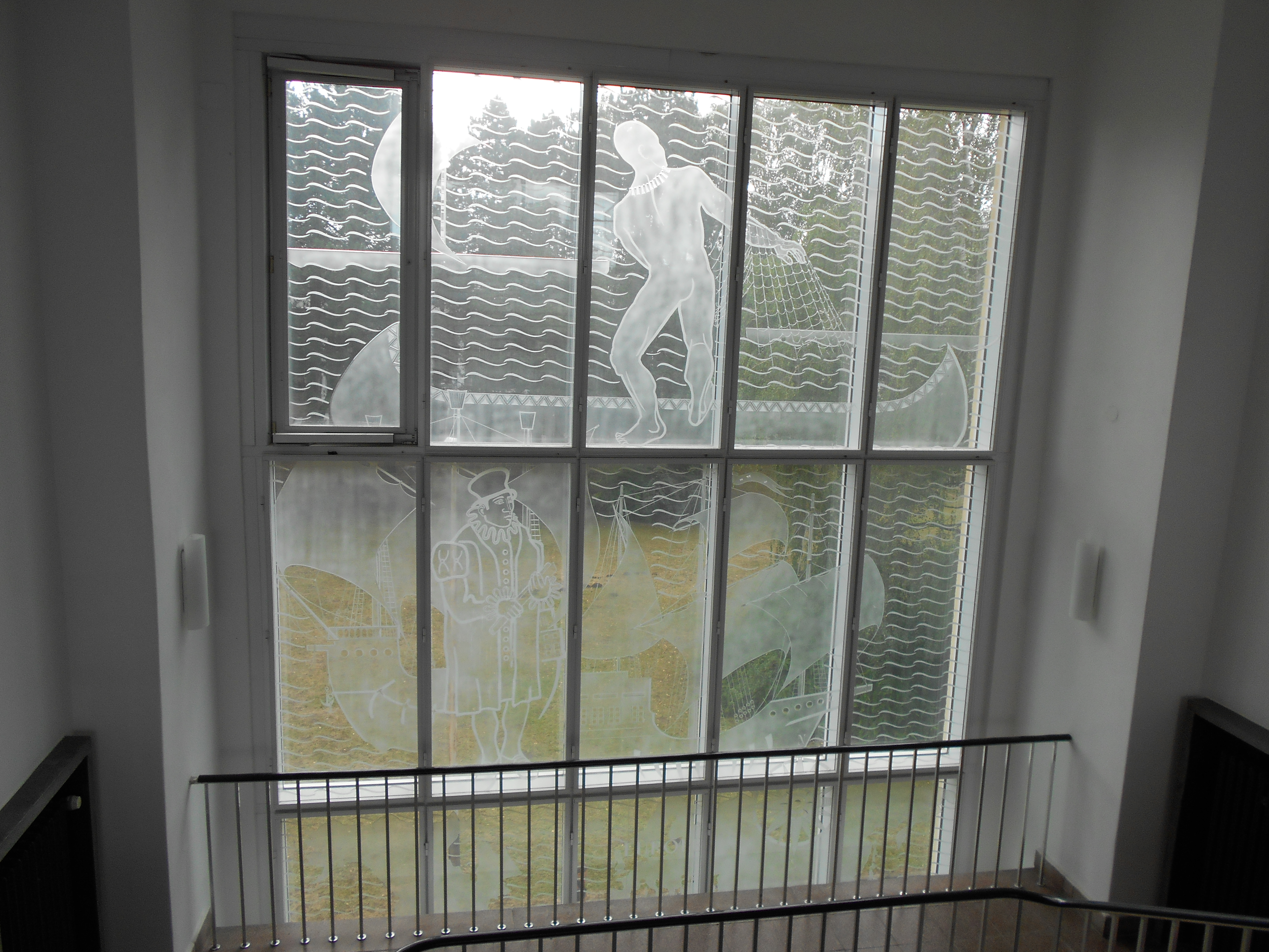 Treppenhaus im Seminargebäude der Schiffbautechnischen Fakultät Rostock